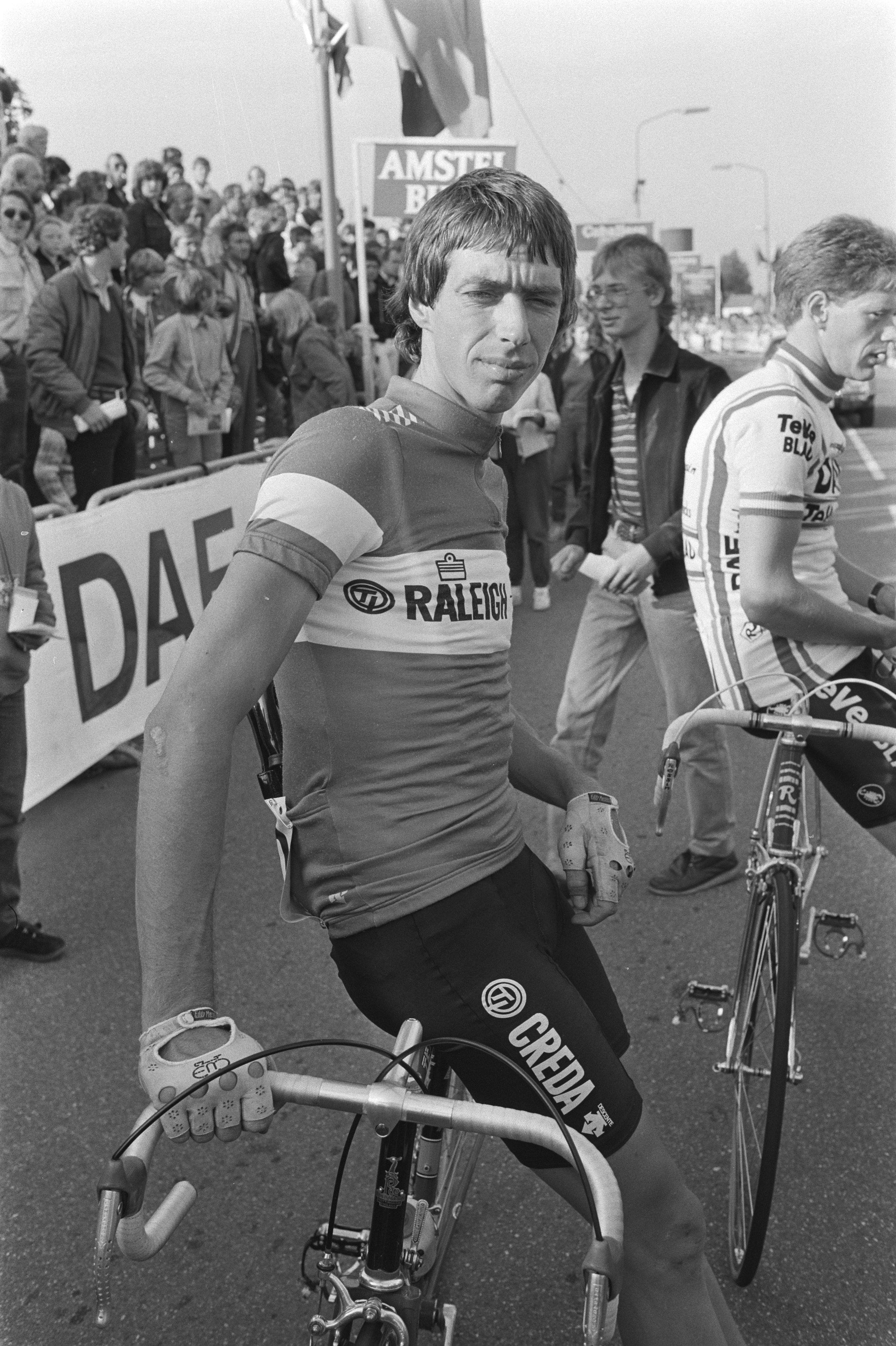 Collectie / Archief : Fotocollectie Anefo Reportage / Serie : [ onbekend ] Beschrijving : Profronde van Tiel; Johan van de Velde bij zijn fiets Datum : 17 augustus 1982 Trefwoorden : fietsen, wielrennen Fotograaf : Antonisse, Marcel / Anefo Auteursrechthebbende : Nationaal Archief Materiaalsoort : Negatief (zwart/wit) Nummer archiefinventaris : bekijk toegang 2.24.01.05 Bestanddeelnummer : 932-2821